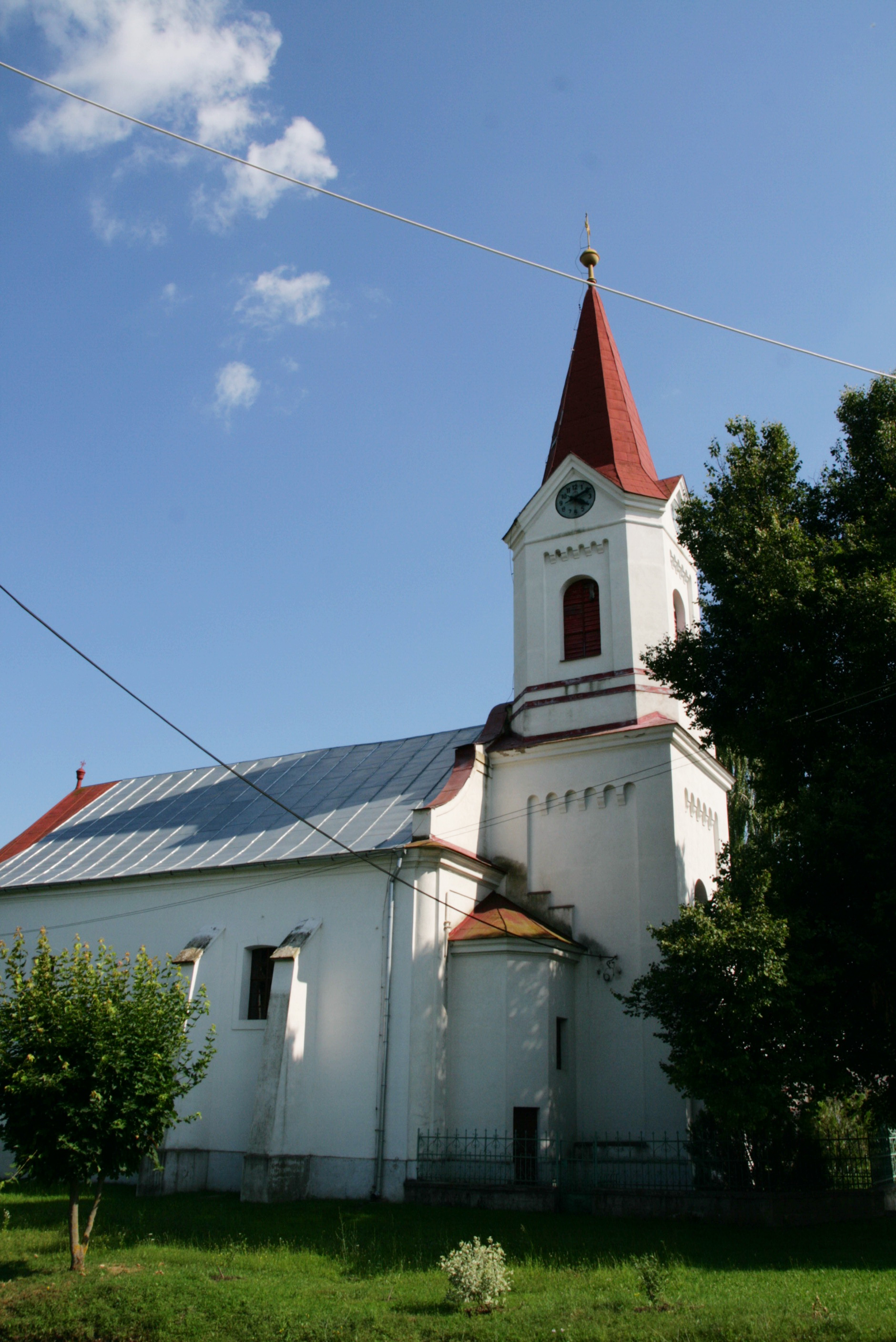 Palogpádár - evangélikus templom